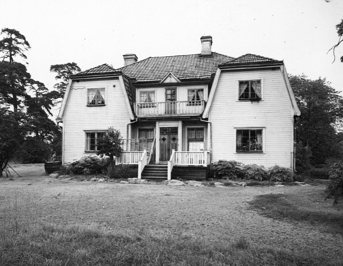 Villa Montebello på Norra Djurgården (riven)